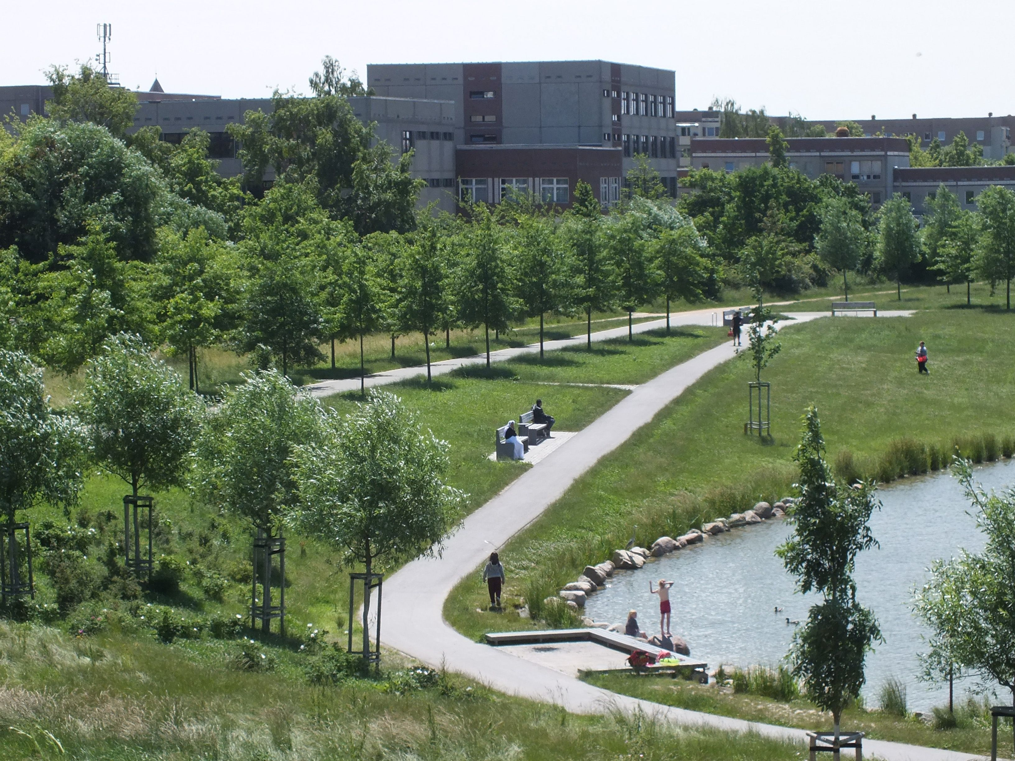 Partie im Bürgerpark Paunsdorf mit Brüder-Grimm-Schule